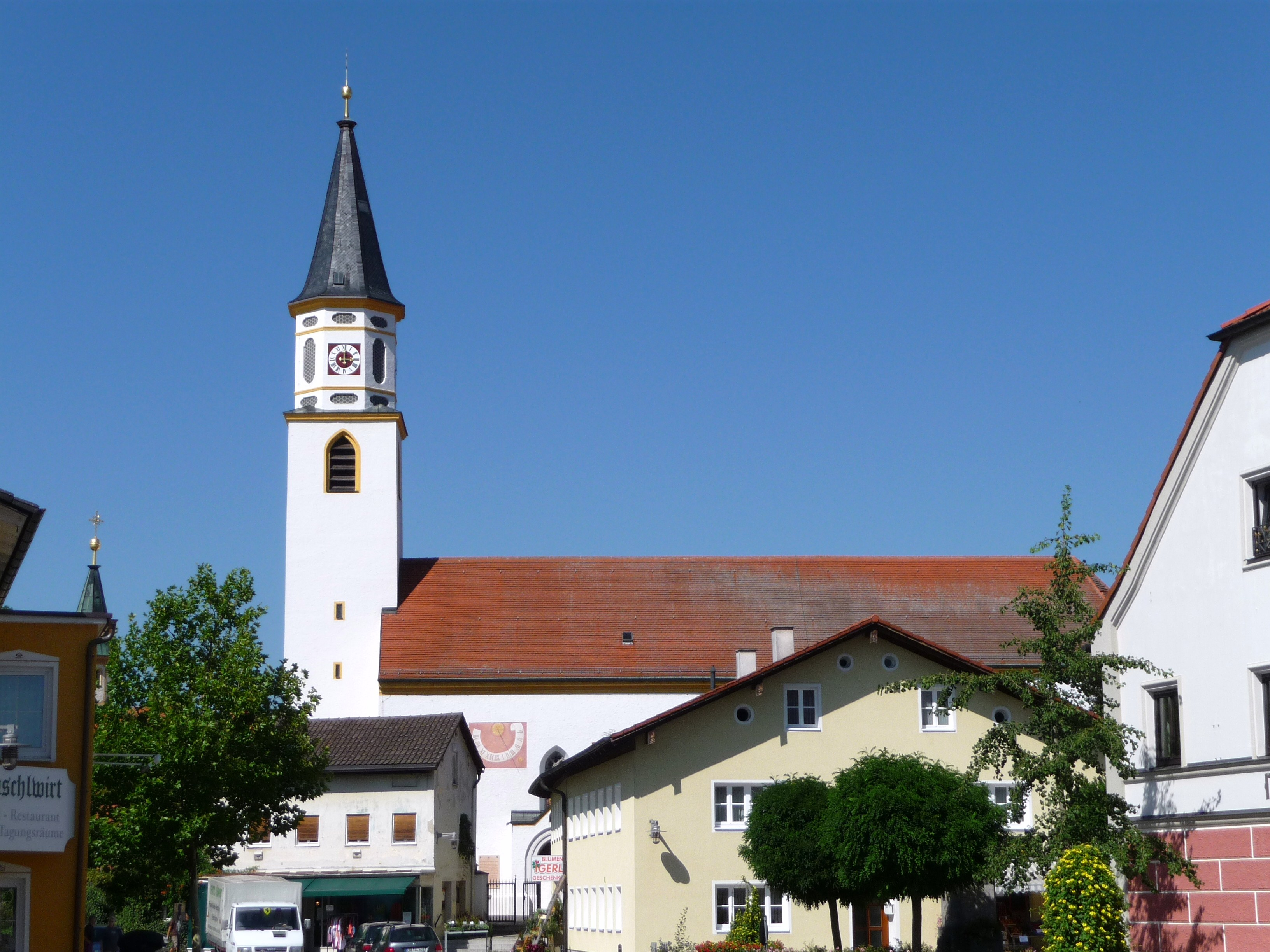 Die Pfarrkirche St. Margareta in Ampfing